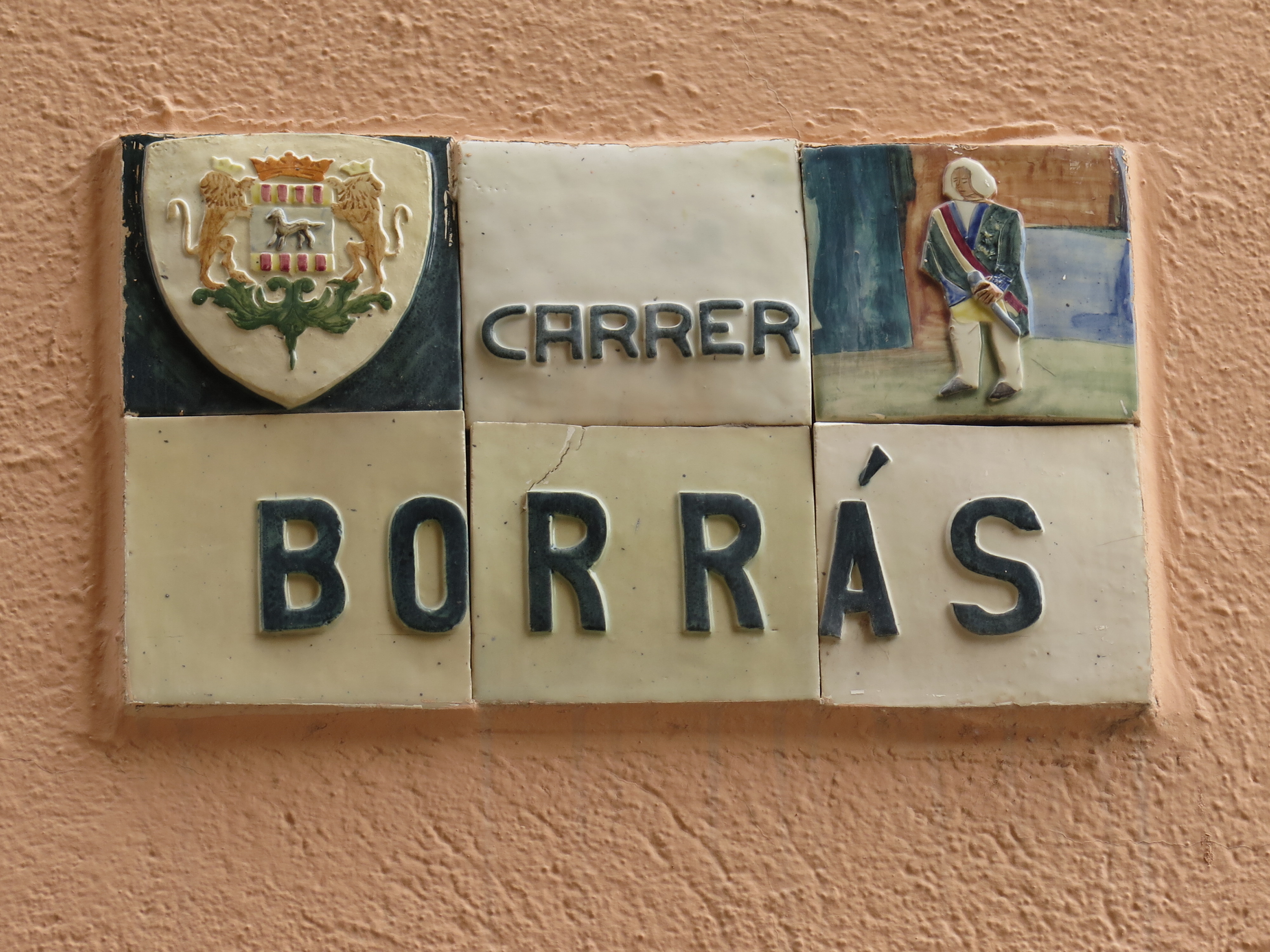 Una de les plaques del carrer dedicat a Joan Borràs i Grisola al municipi de Cambrils